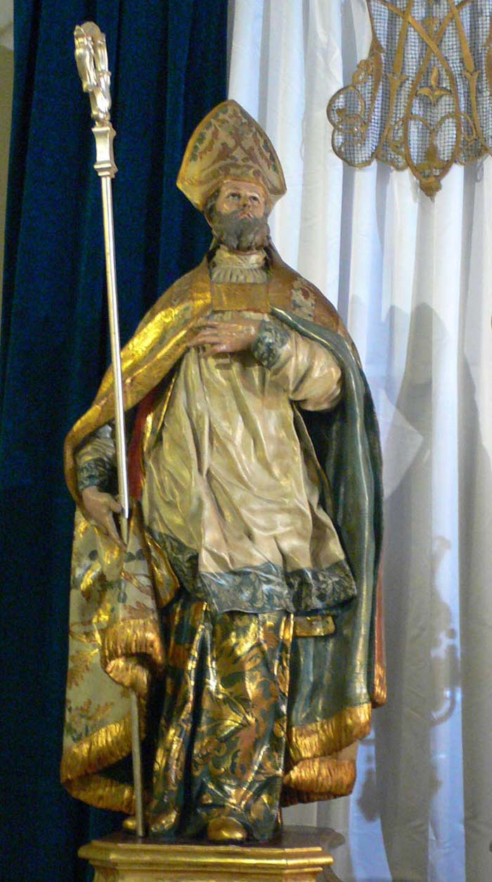 Talla barroca de San Leandro realizada por Francisco Salzillo en 1755. Iglesia de Sta.María de Gracia en Cartagena (España)